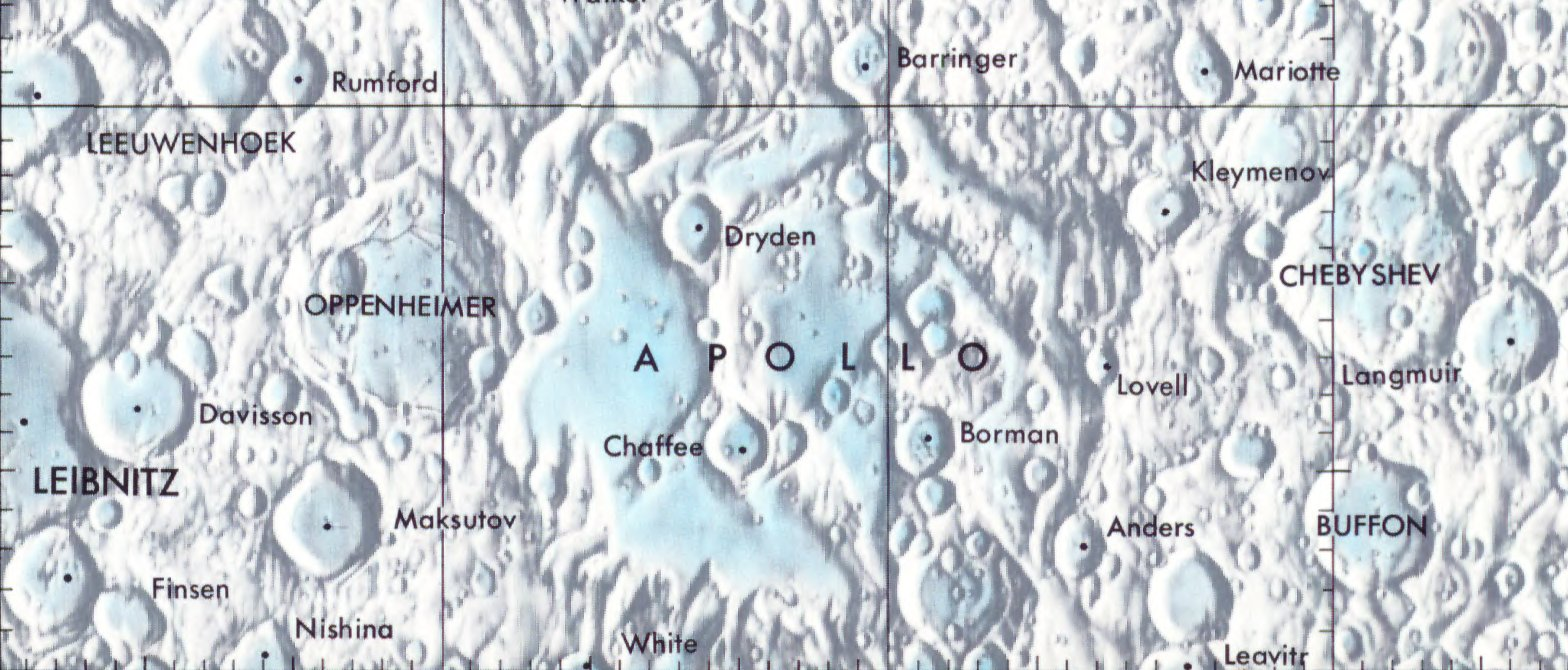 Cráter lunar Apollo. Localización. (Lunar Chart LPC1. Second Edition)